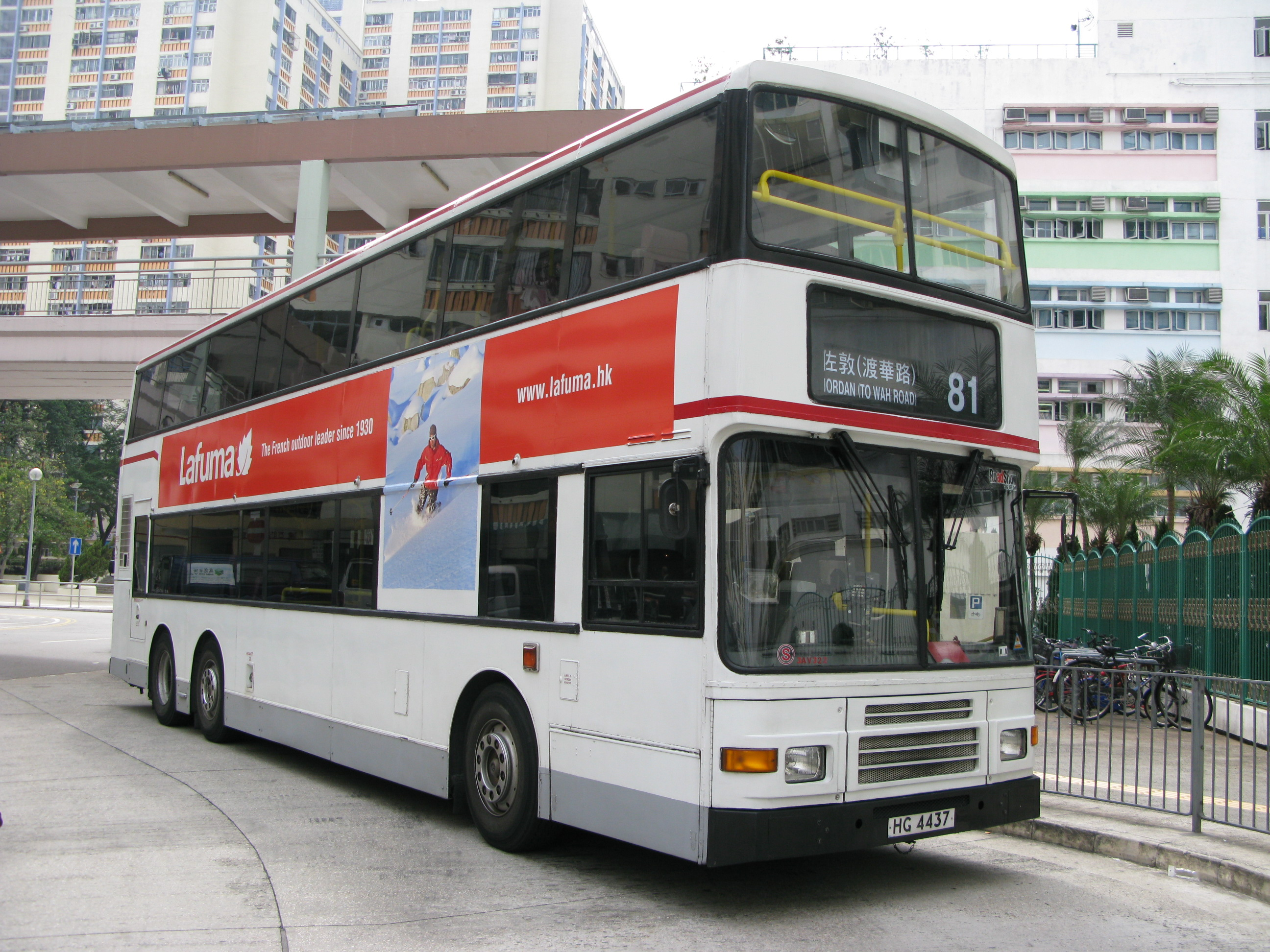 中文（香港）: 一輛行走九龍巴士81線的巴士，正駛進禾輋邨巴士總站